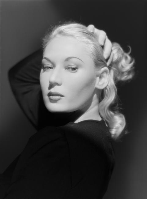 Retrato de Sam Levin de la actriz argentina Tilda Thamar, año 1949